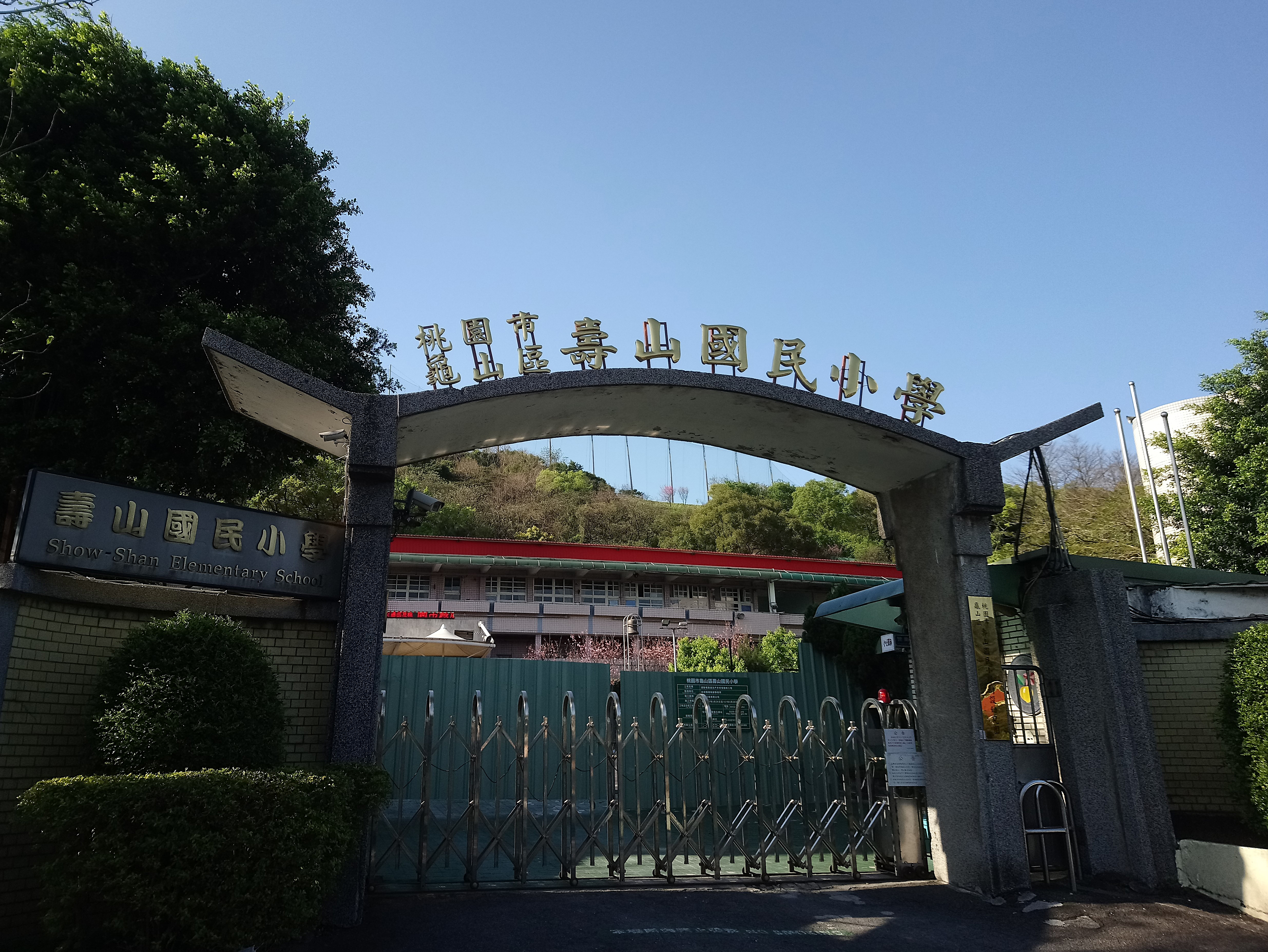 桃園市龜山區壽山國民小學,桃園市龜山區嶺頂里